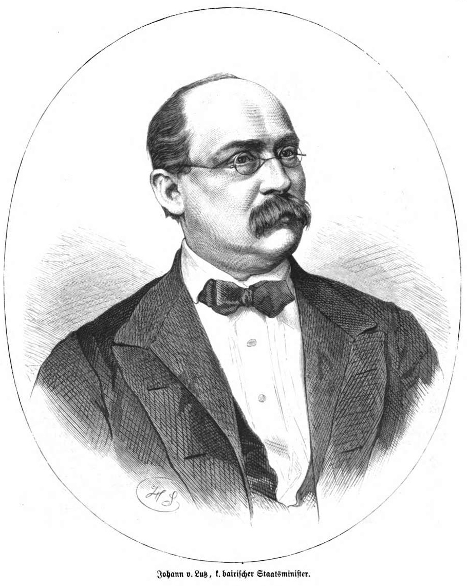 Johann von Lutz, bayerischer Staatsminister im 19. Jh.